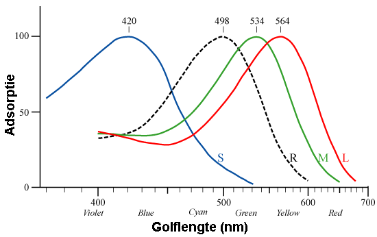 kleurrespons kegeltjes in oog (S,M en L) en van de staafjes (R). wiki en; GNU FDL. GFDL